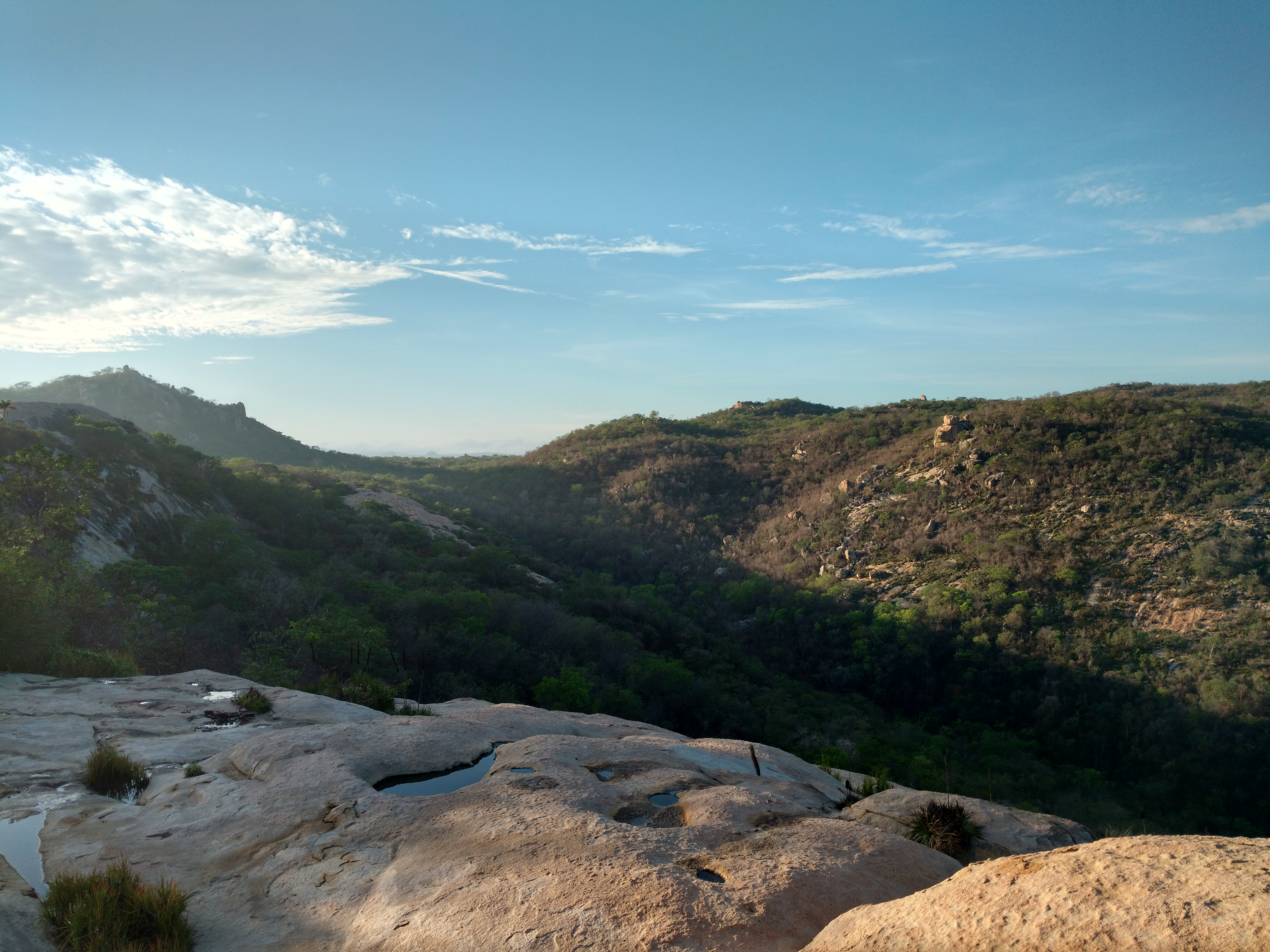 Uma manhã linda na caatinga.